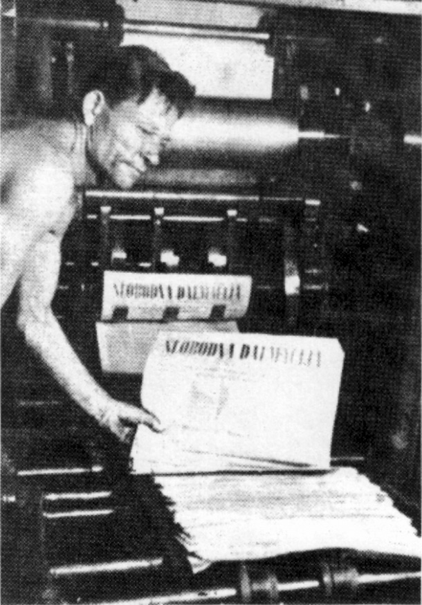 Prvi broj Slobodne Dalmacije u slobodnom Splitu 1943.Srpskohrvatski / српскохрватски: Prvi broj Slobodne Dalmacije u slobodnom Splitu 1943.